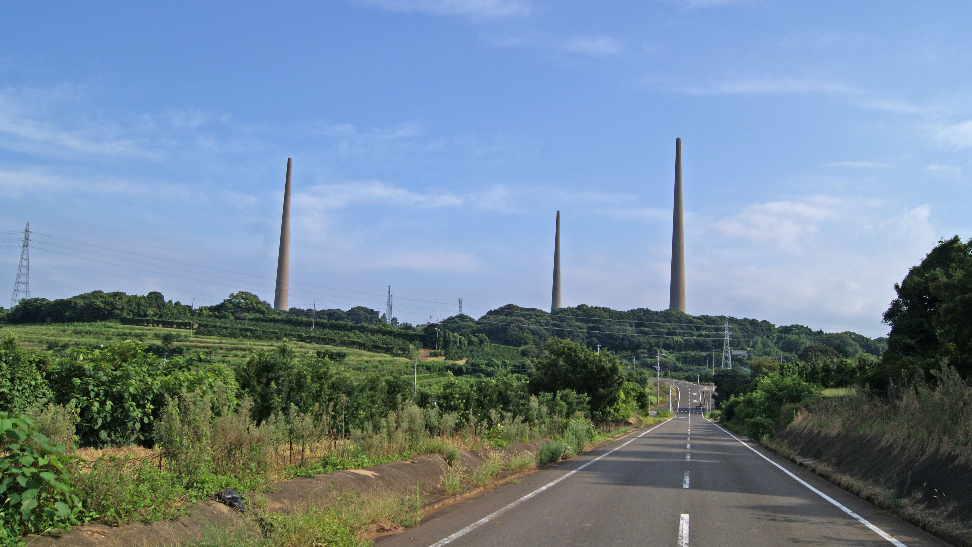 針尾無線塔